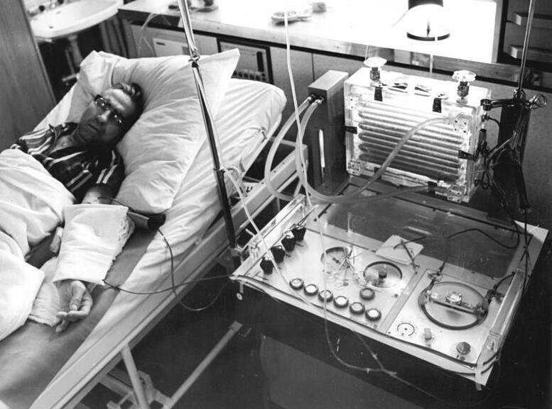 Leipzig, Universitätsklinik, Nierenzentrum ADN-ZB Raphael 29.2.72 Leipzig: Nierenzentrum- Ein modernes Nierenzentrum, in dem chronische und akute Nierenerkrankungen behandelt und geheilt werden, besitzt die Leipziger Karl-Marx-Universität seit September 1971. Die Grundlage für die Ausstattung bildet das weiterentwickelte System für die Hämo- und Peritonealdialyse vom MLW-Anlagenbau Dresden. Die Einrichtung stammt vom Leipziger Kombinat Medizin- und Labortechnik.